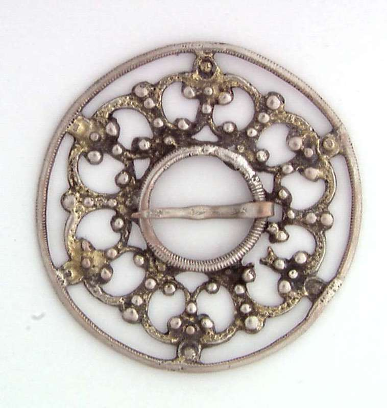 Støpt rosesølje i sølv fra Nome i Telemark. Foto Anne-Lise Reinsfelt / Norsk Folkemuseum, NF.1911-0285.